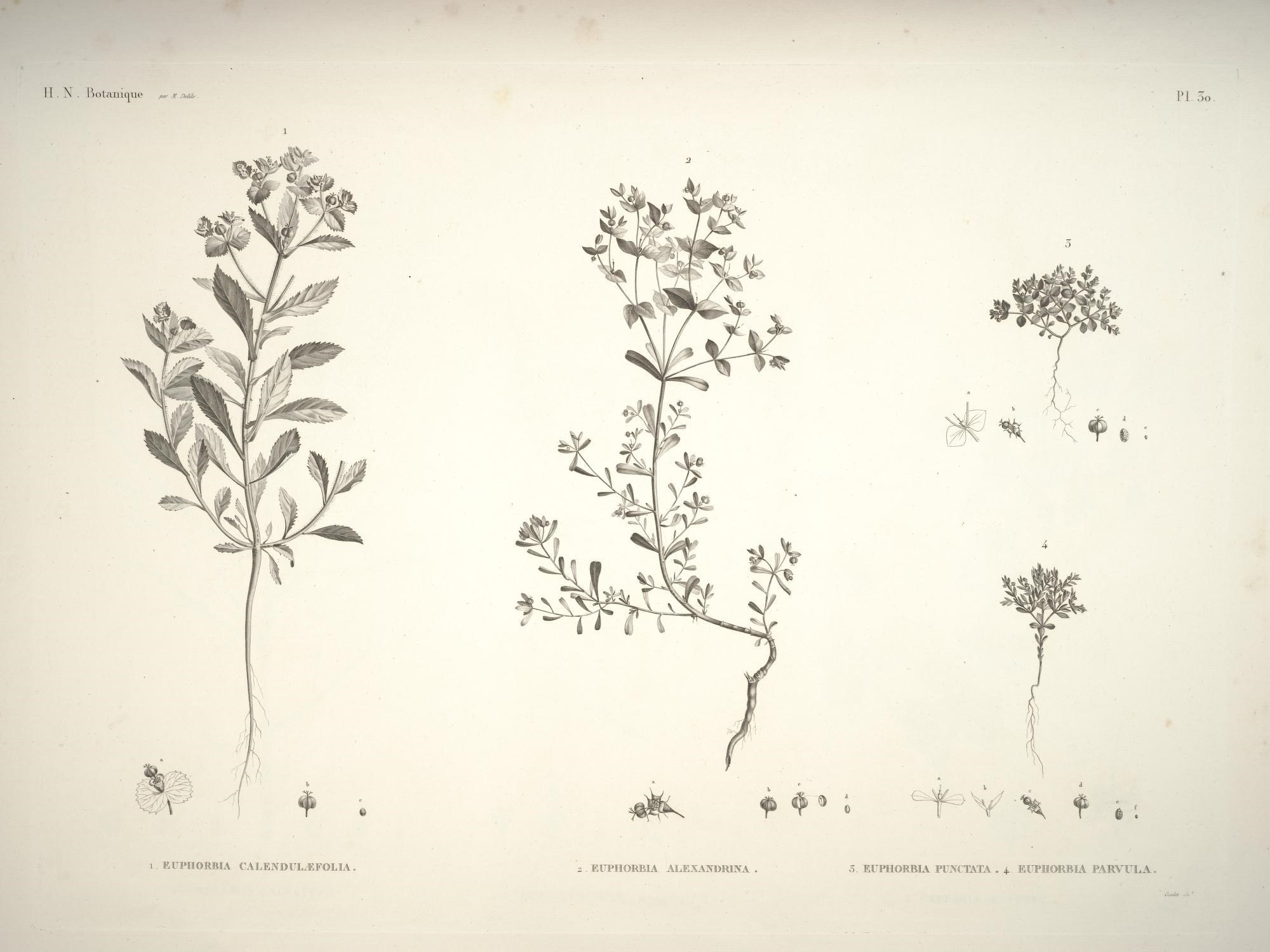 J H . N . BotajiiQiie /?(zr ^. J)eli& \ ' ■ \ 1 \ El O \ V ' r \ \ j 2 r. .' A \ / X J 5 — X-' N N a V y • s 1 • / \ ^ * \ /' / i - 4 / 3l ^ a ' ' T* c "b i i /^ 7 1. EFPnOJRBIA. CALEIVDULtÏ^FOLIA 5 L\. P i . EUtt^îIOHBIA EA_R^ A '^ (^ûu/eé u c -I r i_